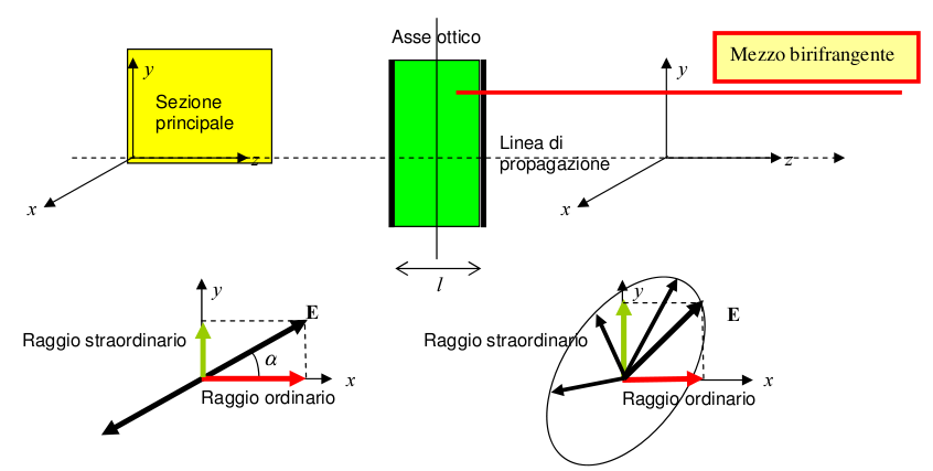 Schema del funzionamento di una lamina quarto d'onda per la conversione della polarizzazione della radiazione elettromagnetica